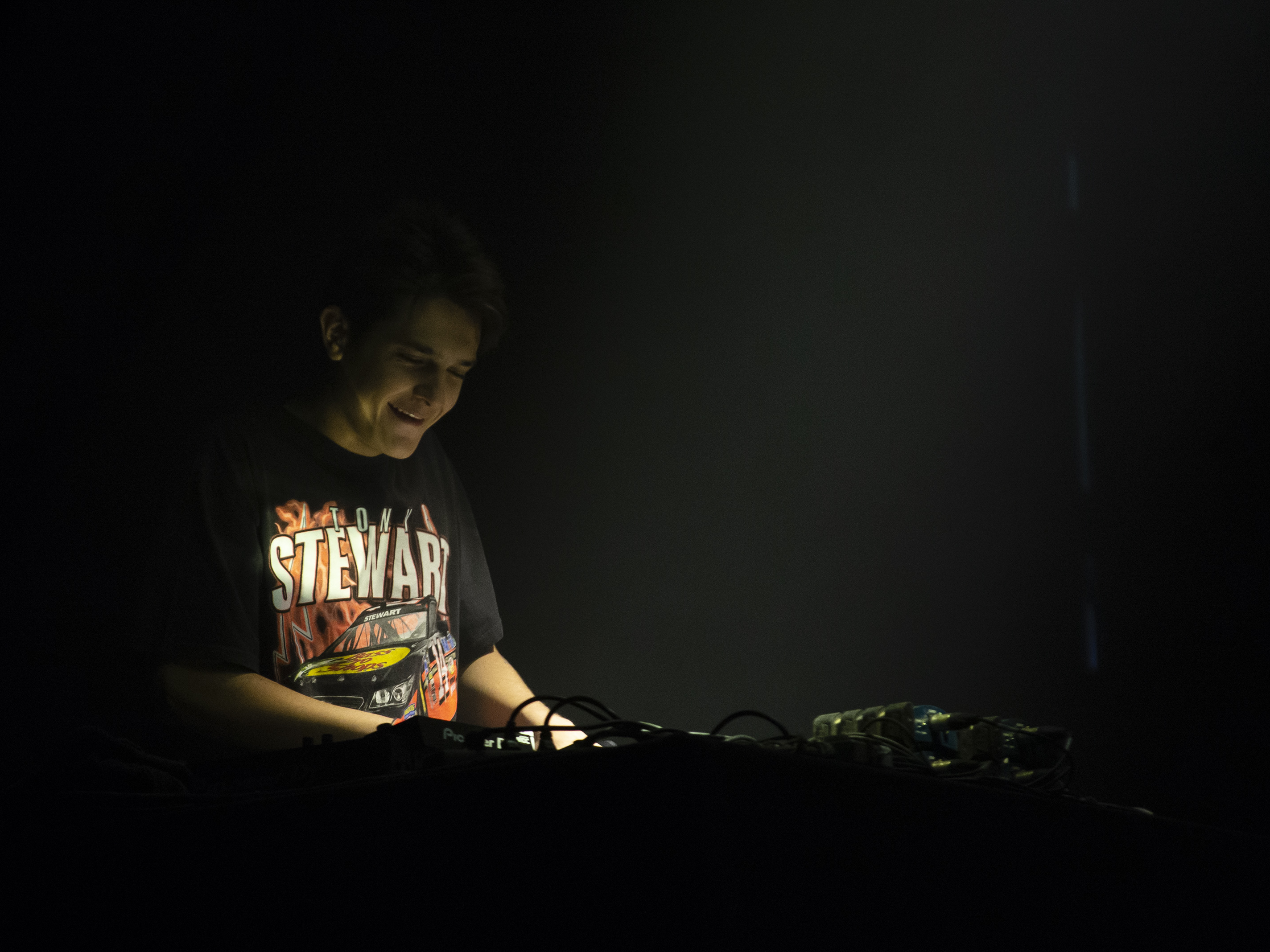 Le DJ Kungs au festival Papillons de nuit 2019 à Saint-Laurent de Cuves, Manche, Normandie.